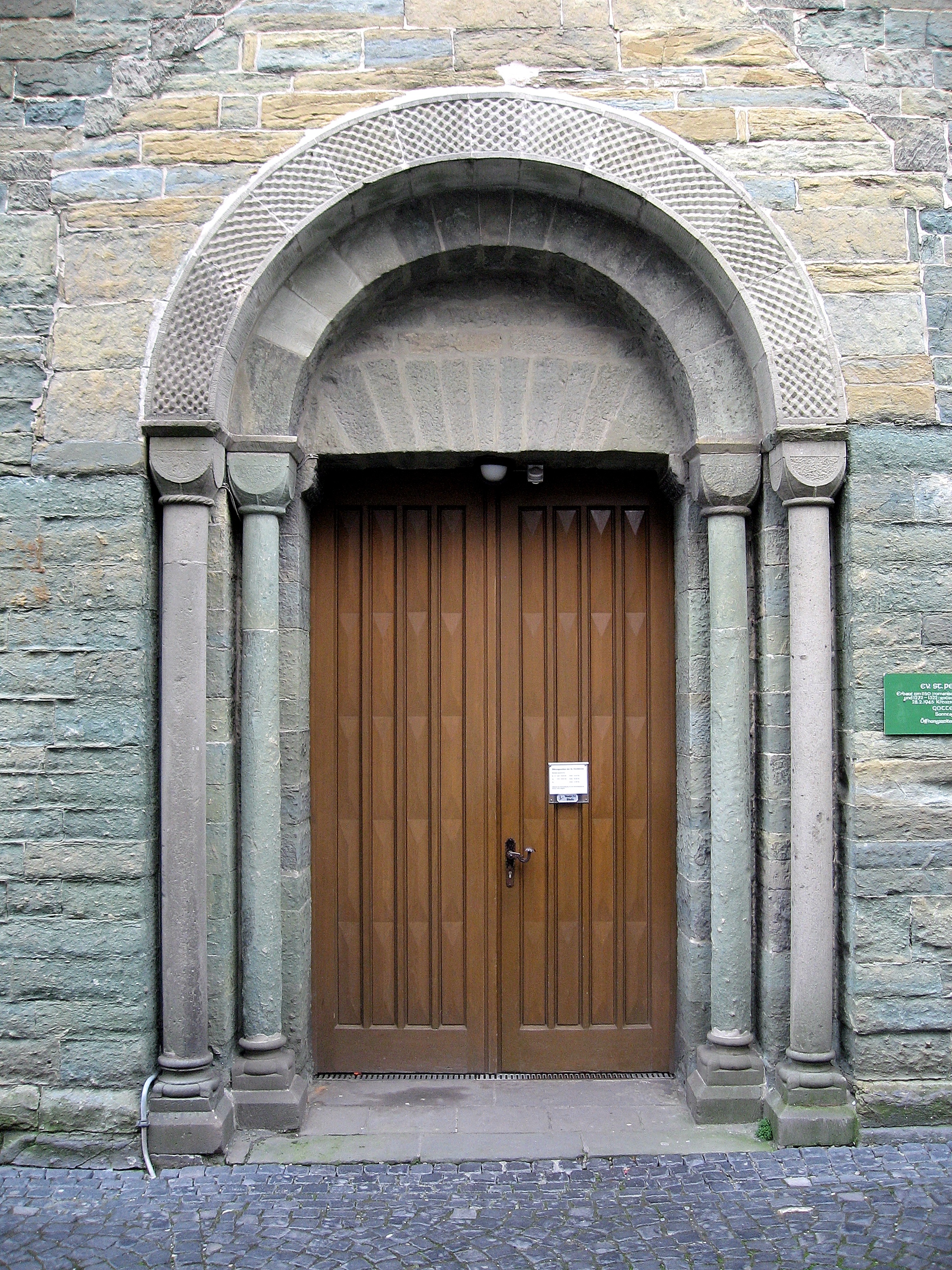 Soest, St. Petri